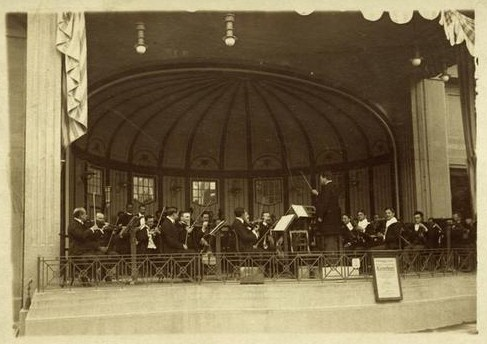 Das Kurorchester Bad Kissingen, damals bestehend aus Musikern des "Wiener Konzertvereins" (heute: Wiener Symphoniker), auf der Bühne der Wandelhalle (in den Kurgarten geöffnet)